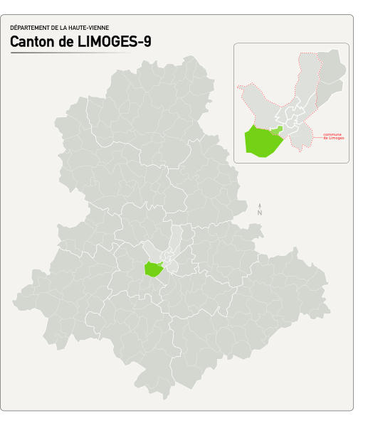 Carte du nouveau canton de Limoges-9.